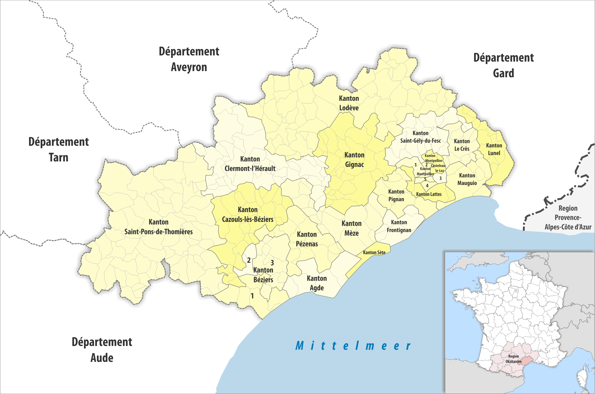 Gemeinden und Kantone im Departement Hérault